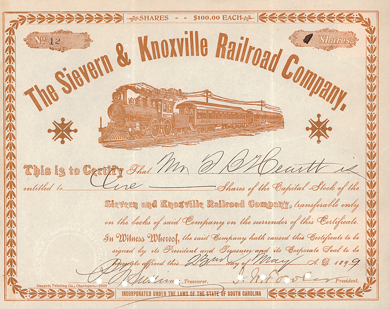 Aktie der Sievern & Knoxville Railroad vom 19. Juni 1901